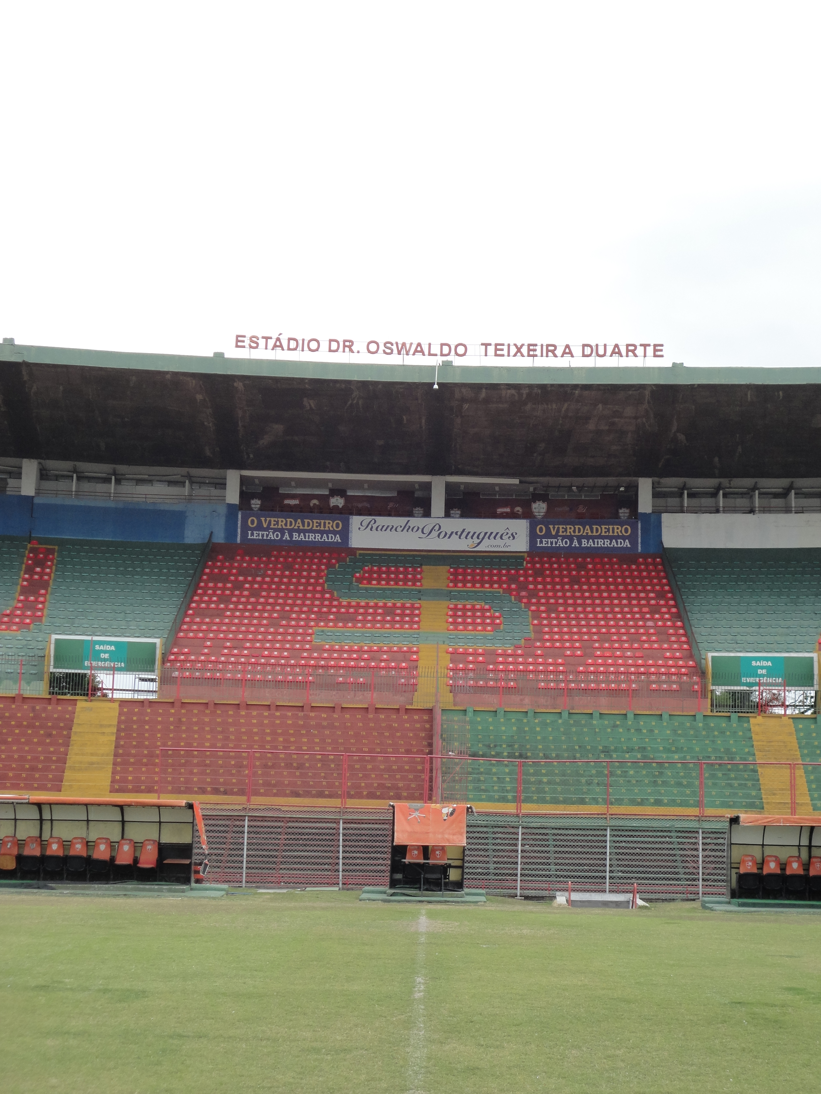 Vista do gramado do Canindé, em São Paulo, Brasil